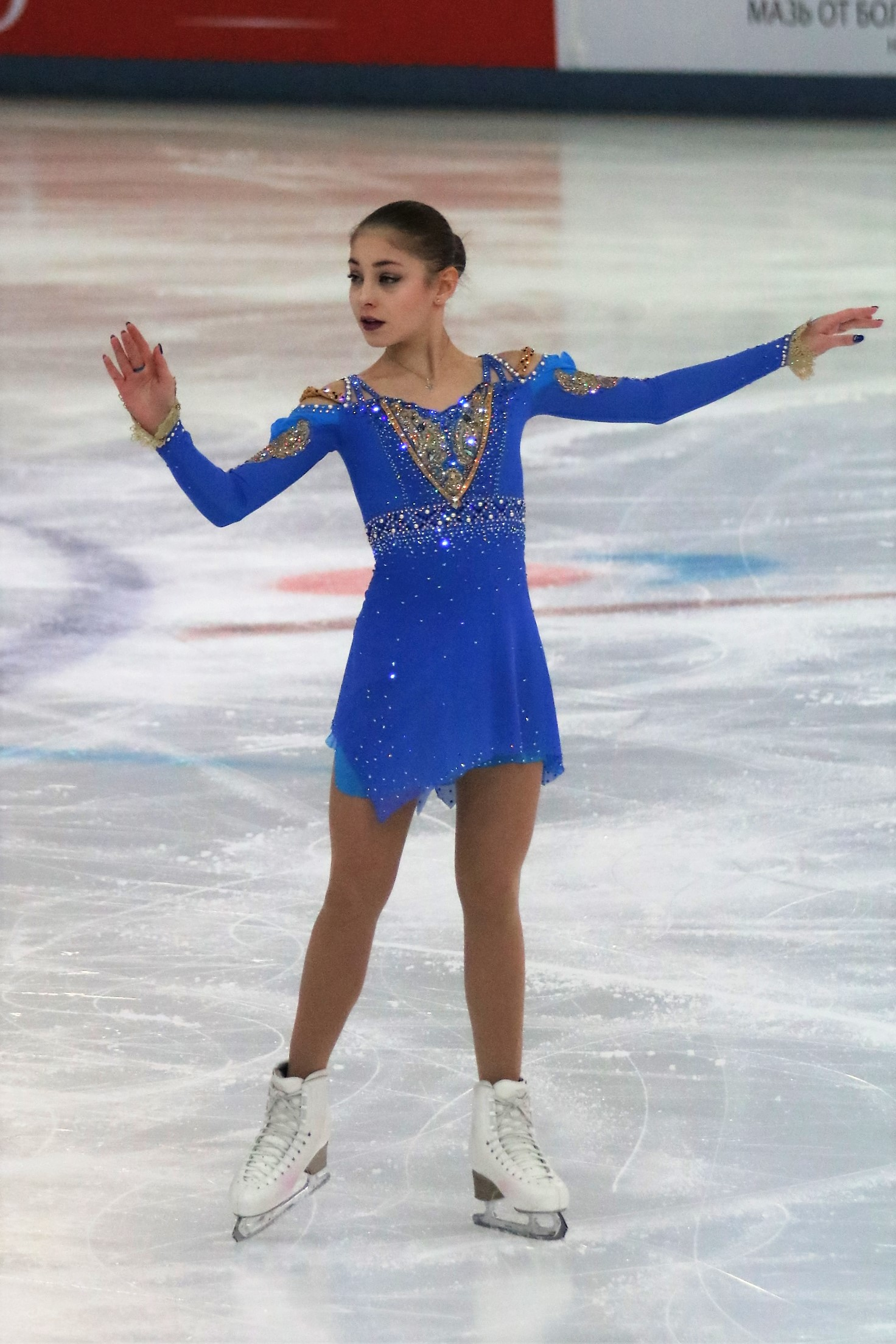 Алена Косторная на чемпионате России по фигурному катанию на коньках 2019